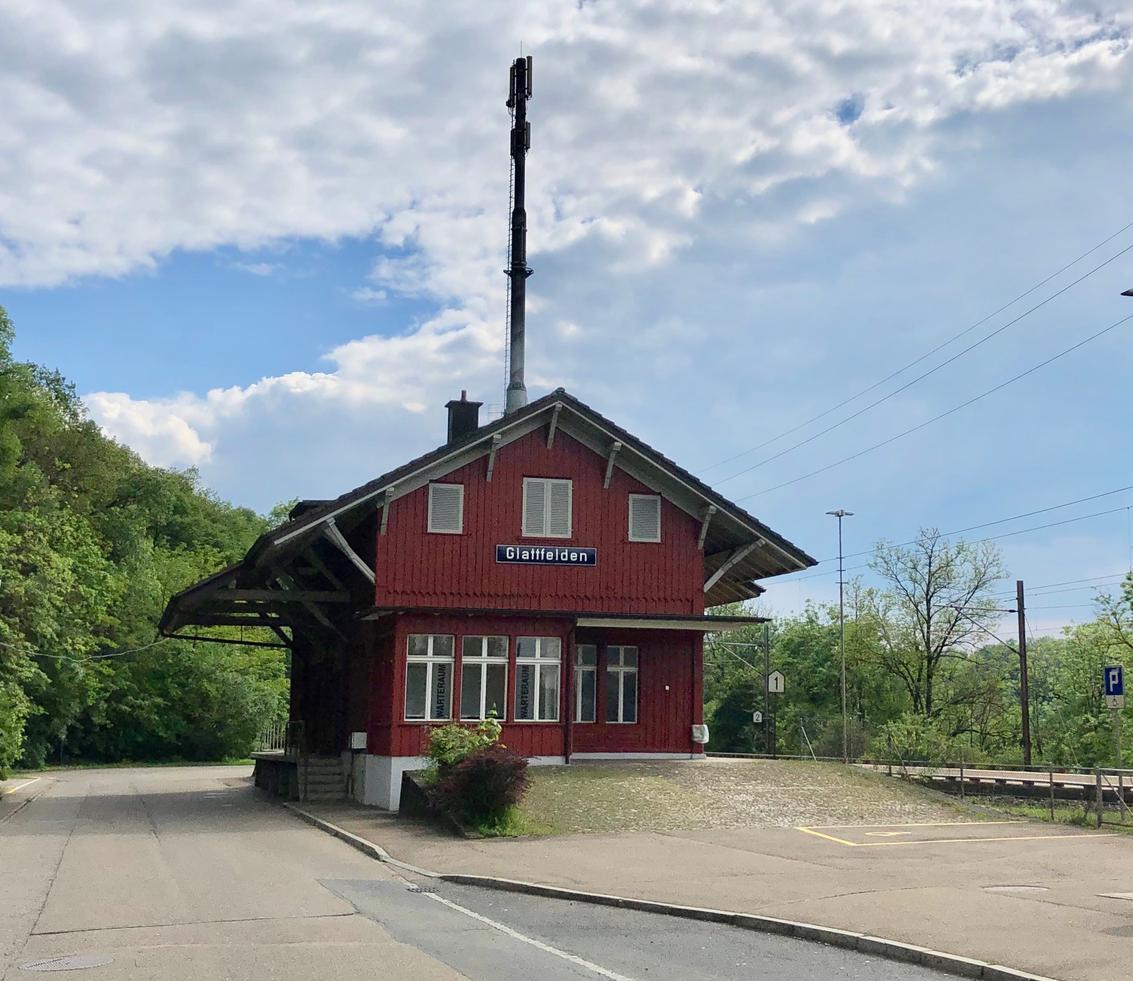 Glattfelden Bahnhof